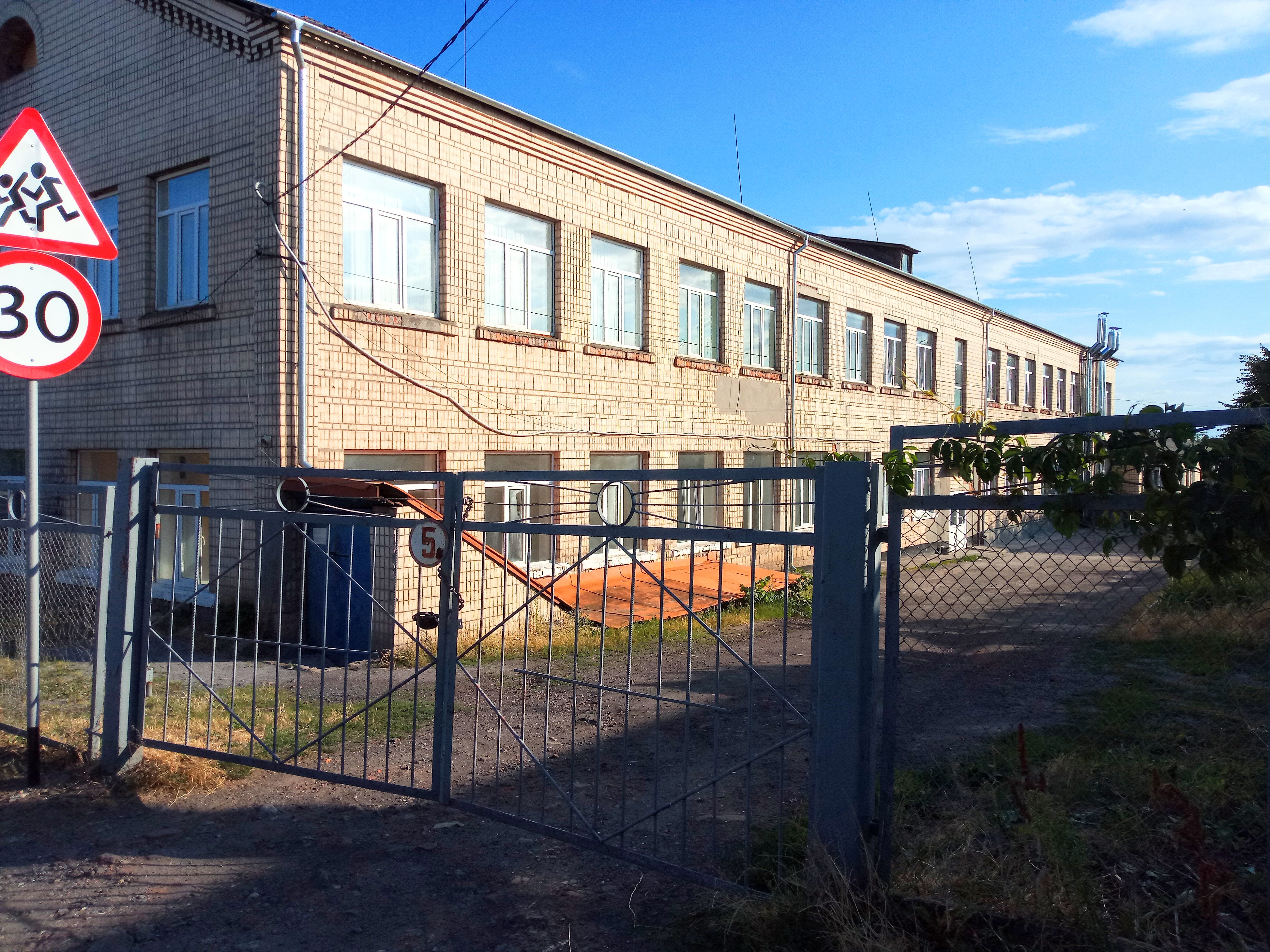 Загальноосвітня школа-гімназія №5 у Жмеринці після виконання робіт з утеплення